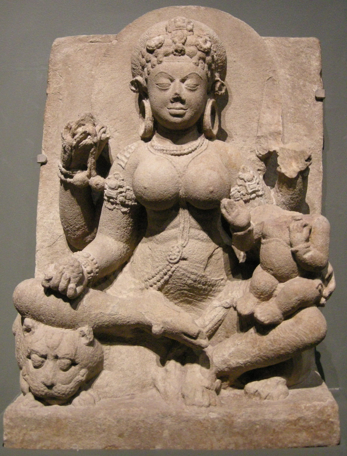 Arte indiana da bihar, dea ambika, VI VII sec